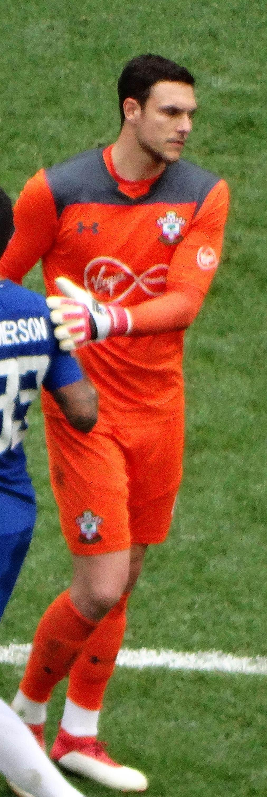 Alex McCarthy